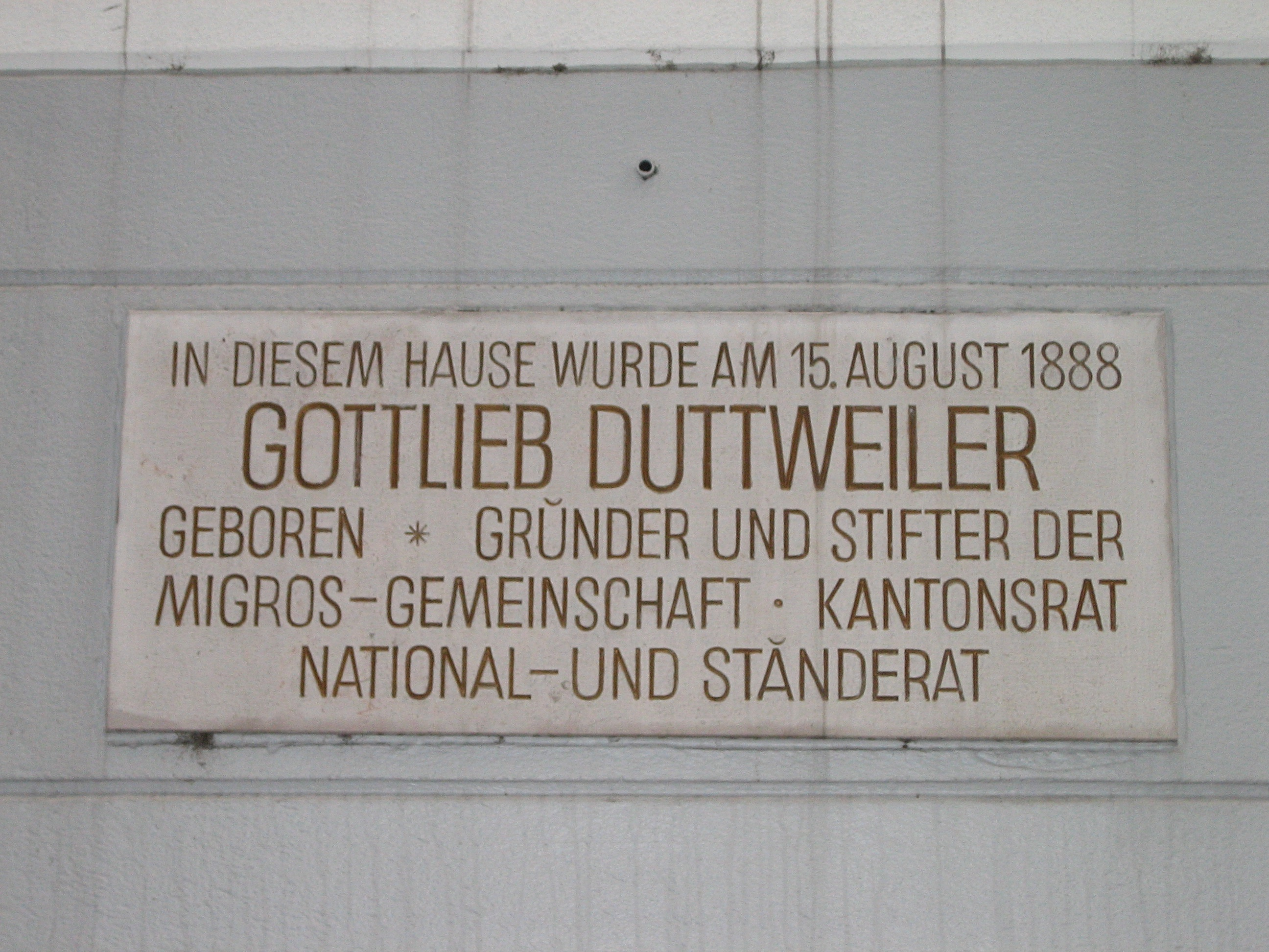 Gedenktafel für Gottlieb Duttweiler an seinem Geburtshaus an der Strehlgasse 13 in der Altstadt von Zürich